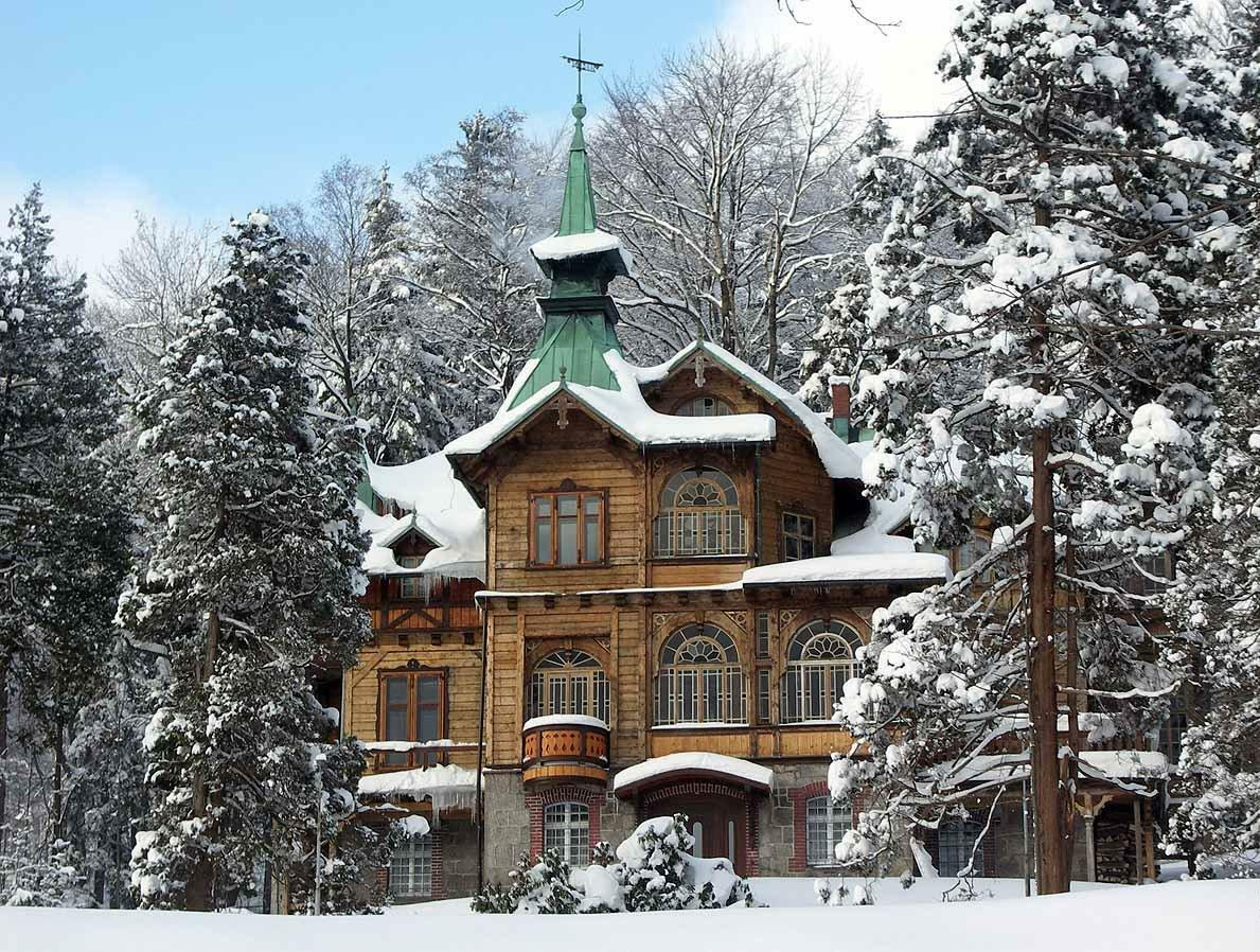 Zimowa "Jaskółka".